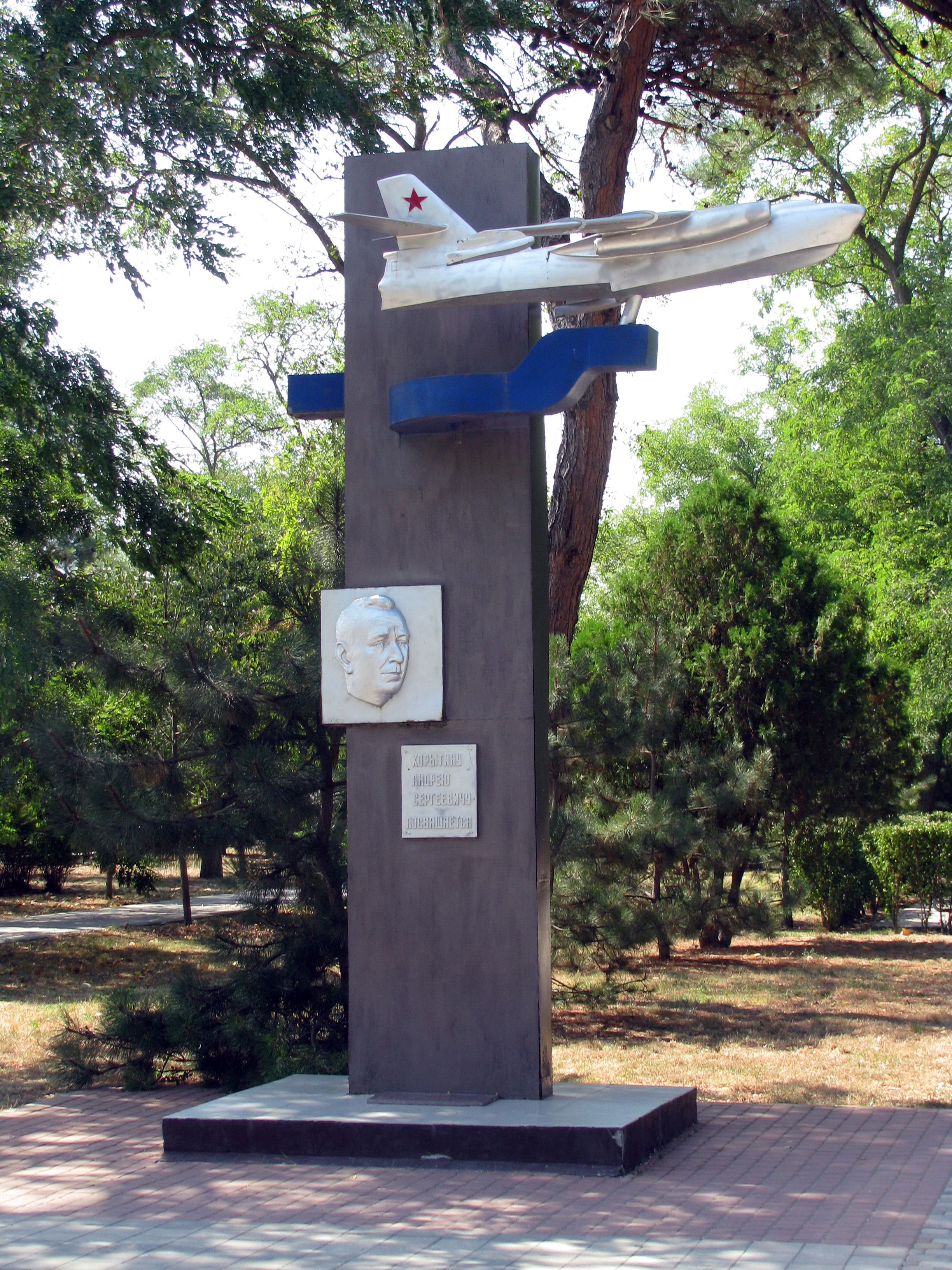 "Корытину Андрею Сергеевичу посвящается", сквер вдоль улиц Крепостная и Протапова, на пересечении с улицей Таманская, Анапа